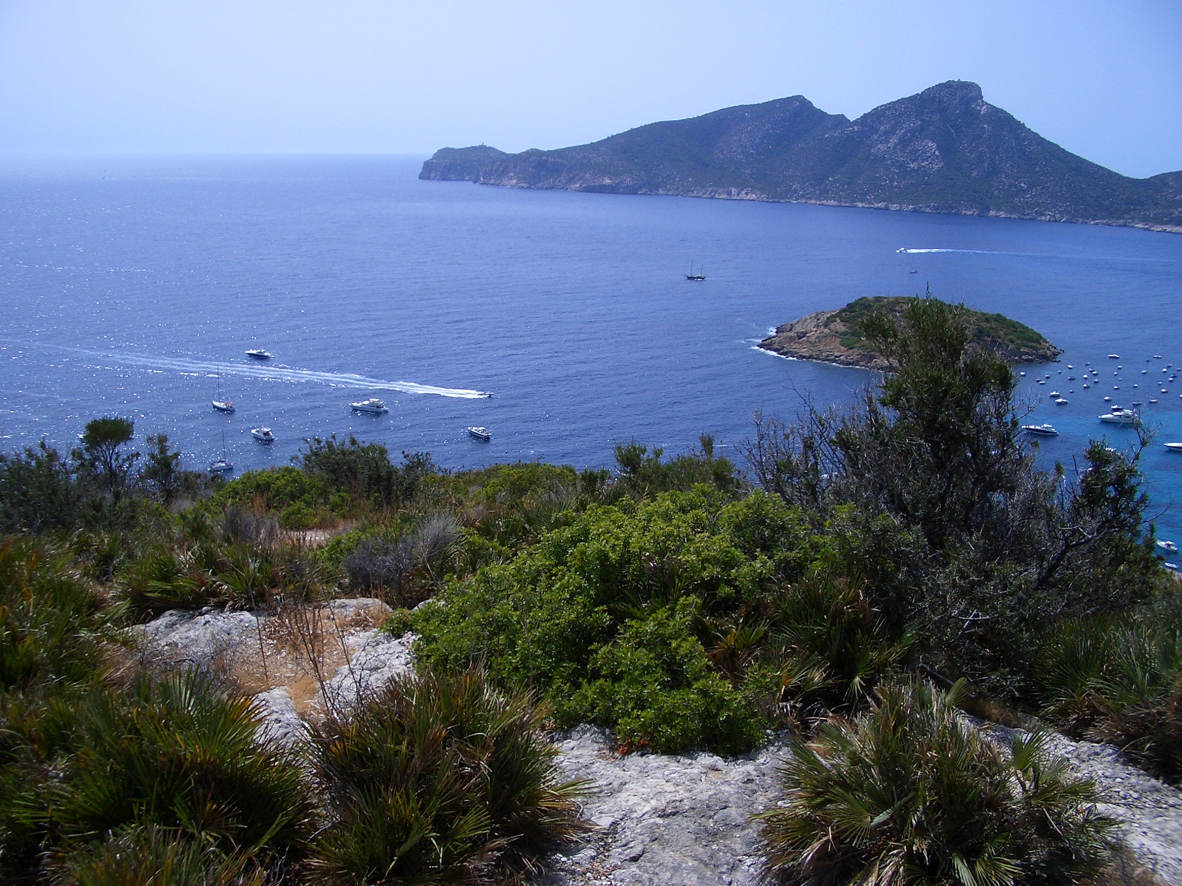 Blick auf die Dracheninsel (Sa Dragonera)